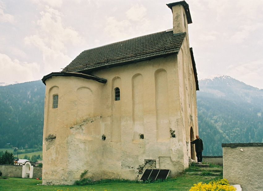 Kreuzkapelle, Benediktinerkloster St. Johann, Müstair